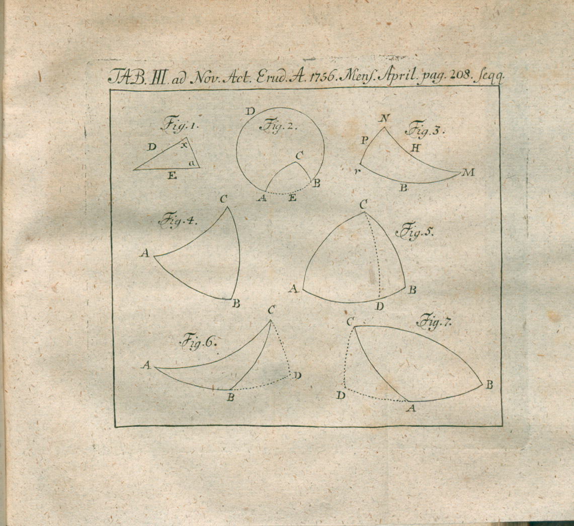 Illustration